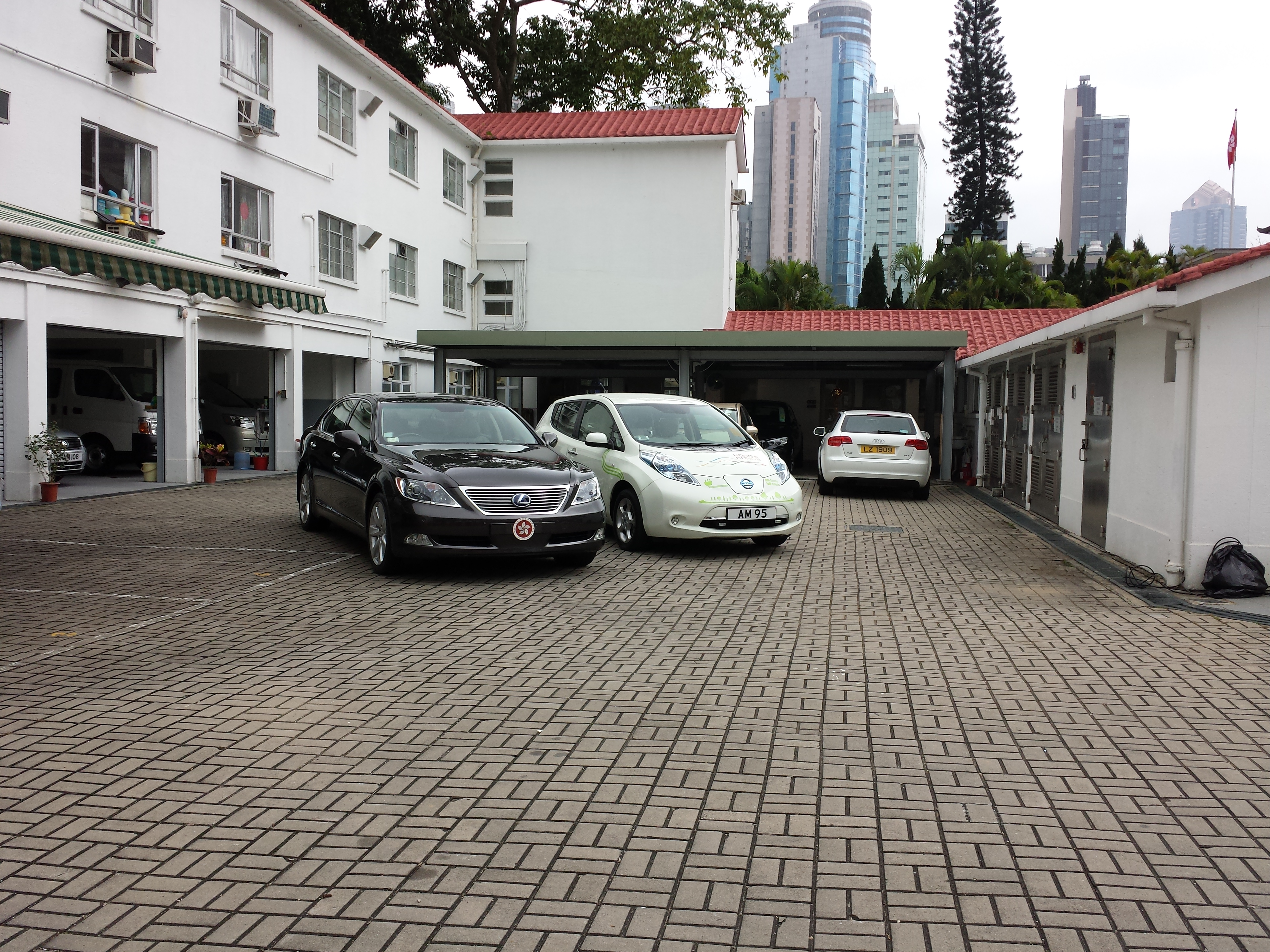 中文（香港）: 行政長官座駕